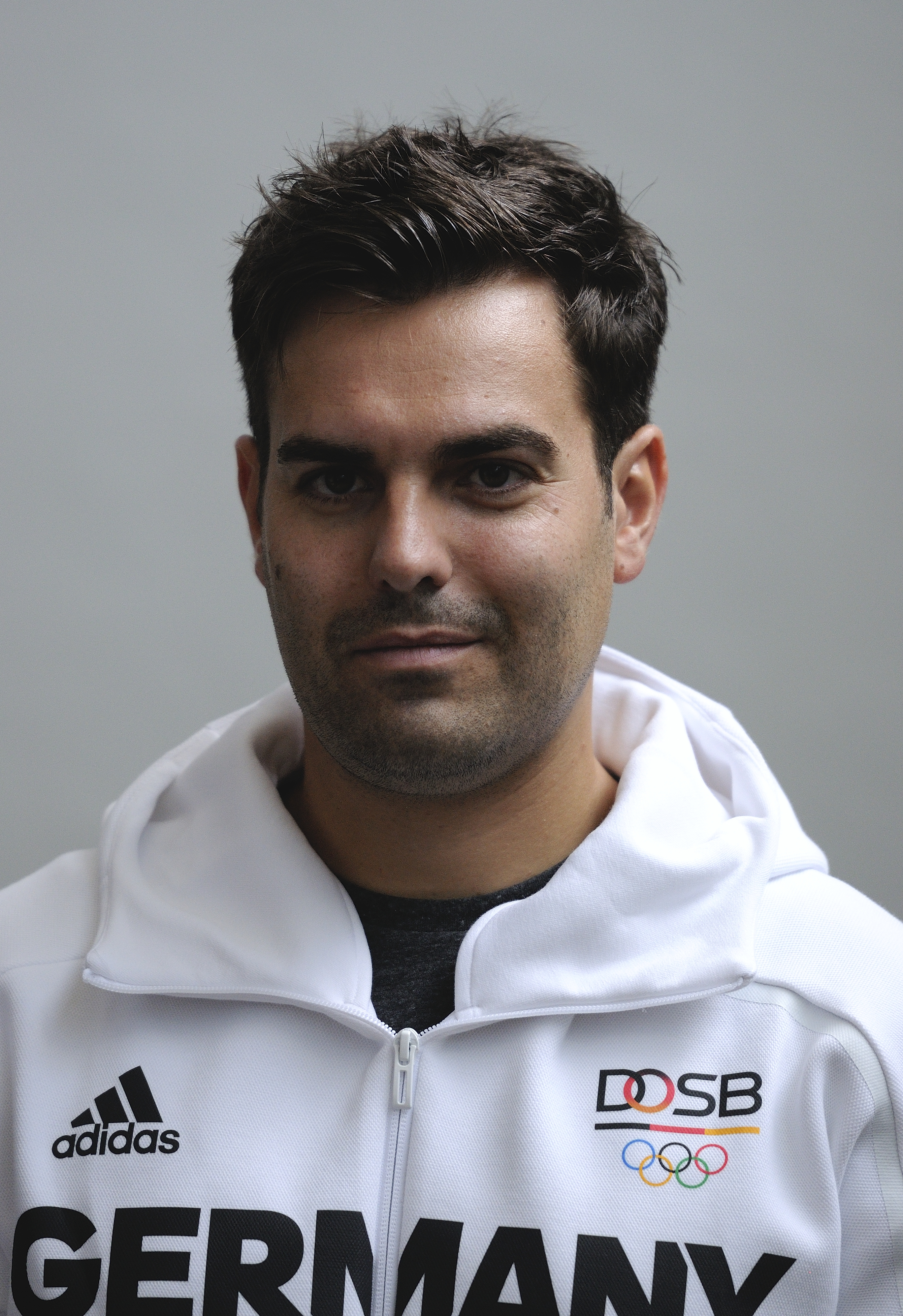 Bild aufgenommen in Hannover während der Einkleidung der deutschen Olympiamannschaft 2016. Julian Justus.